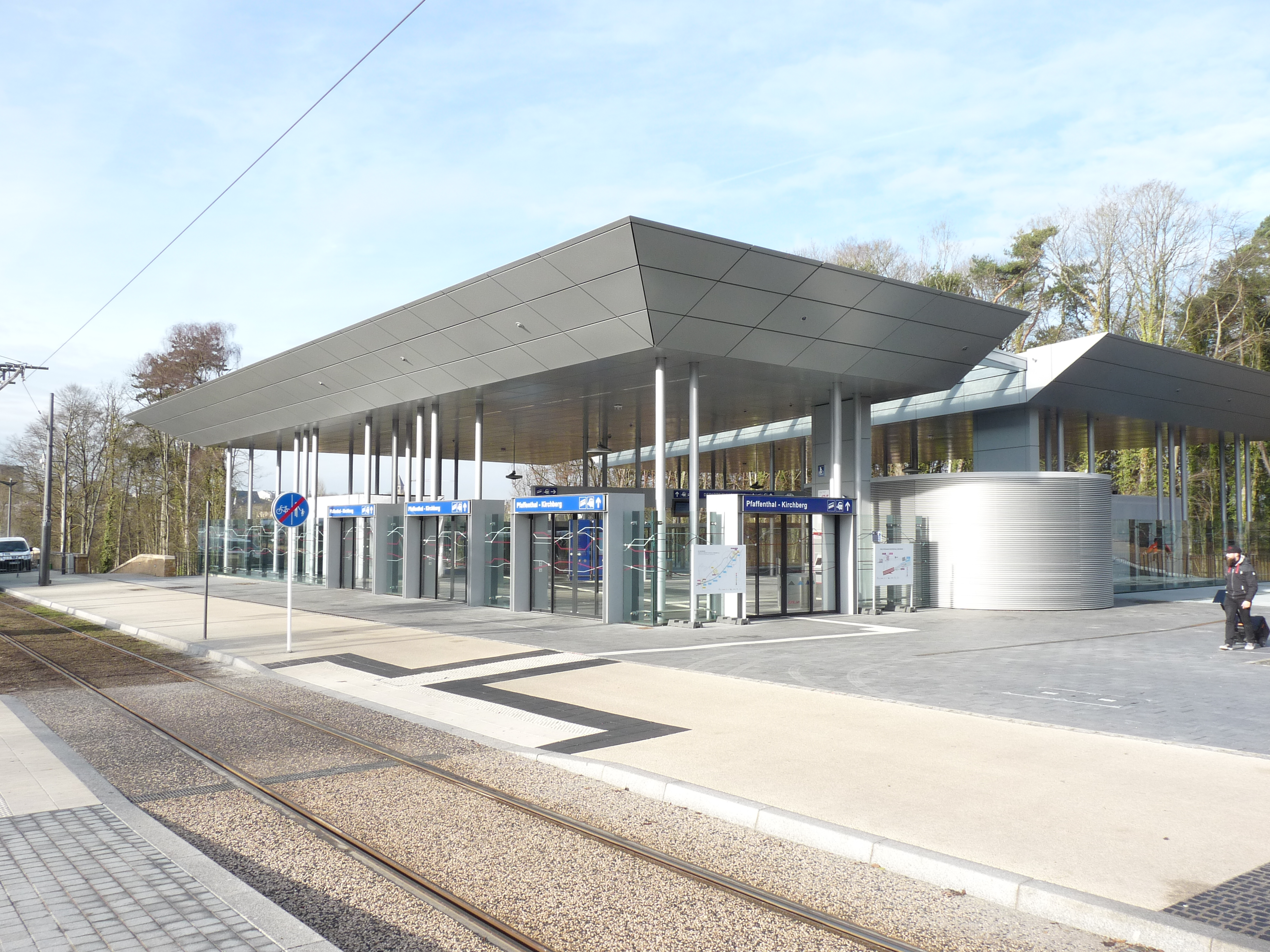 De kabelspoorbaan bij Pfaffenthal-Kirchberg. Bovenstation bij de tram